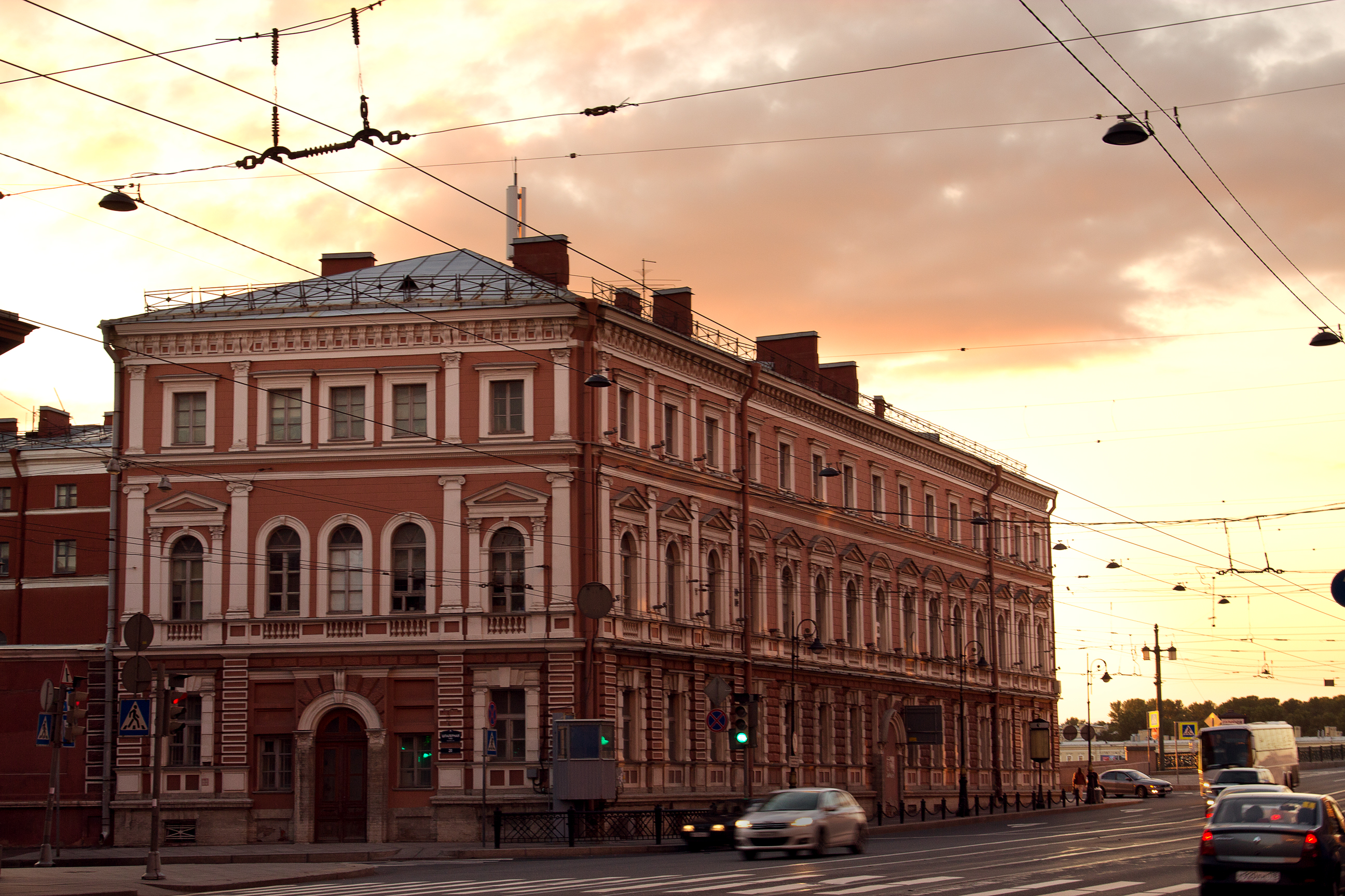 Закат на Литейном